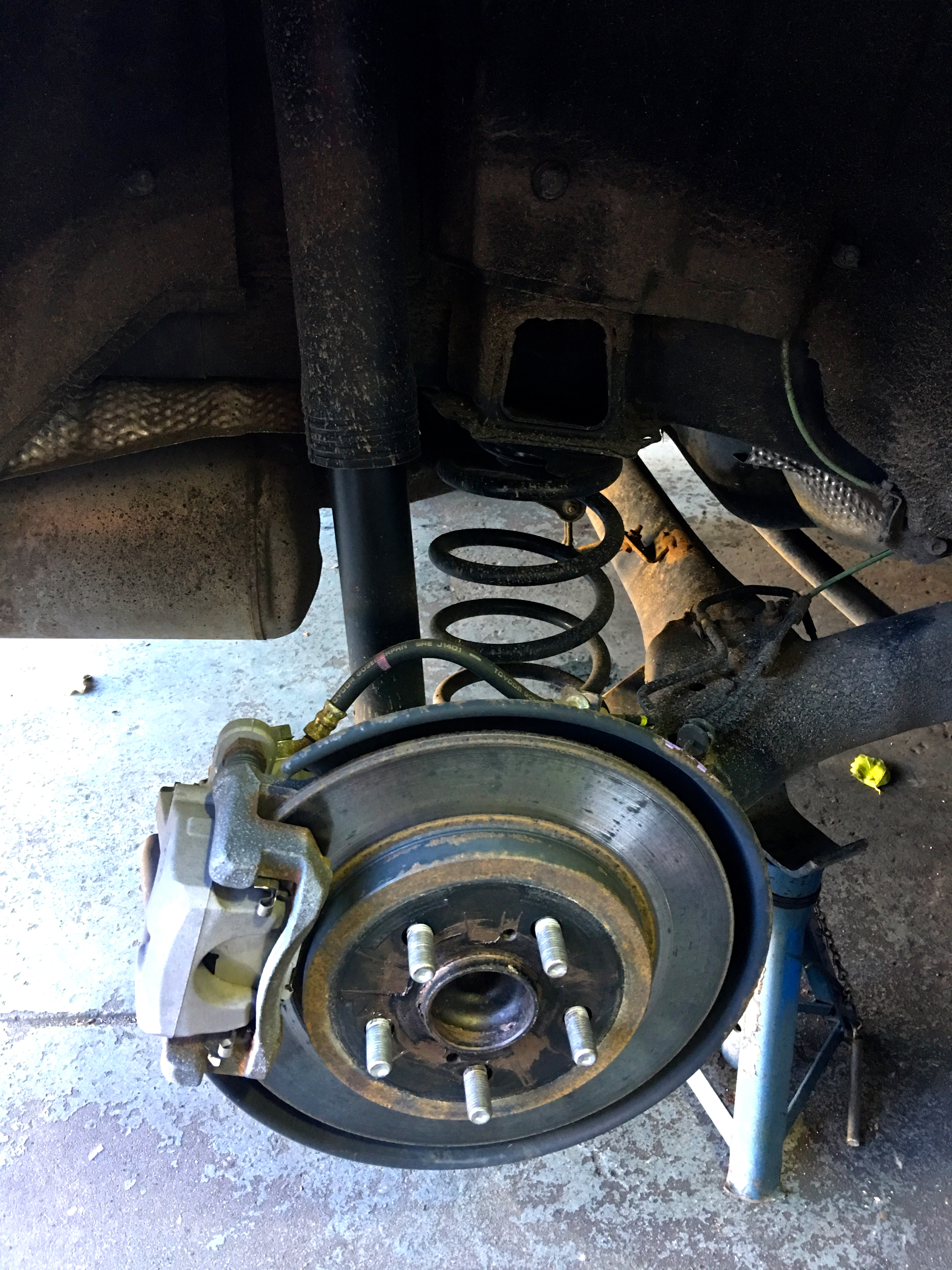 Car tyre replacement